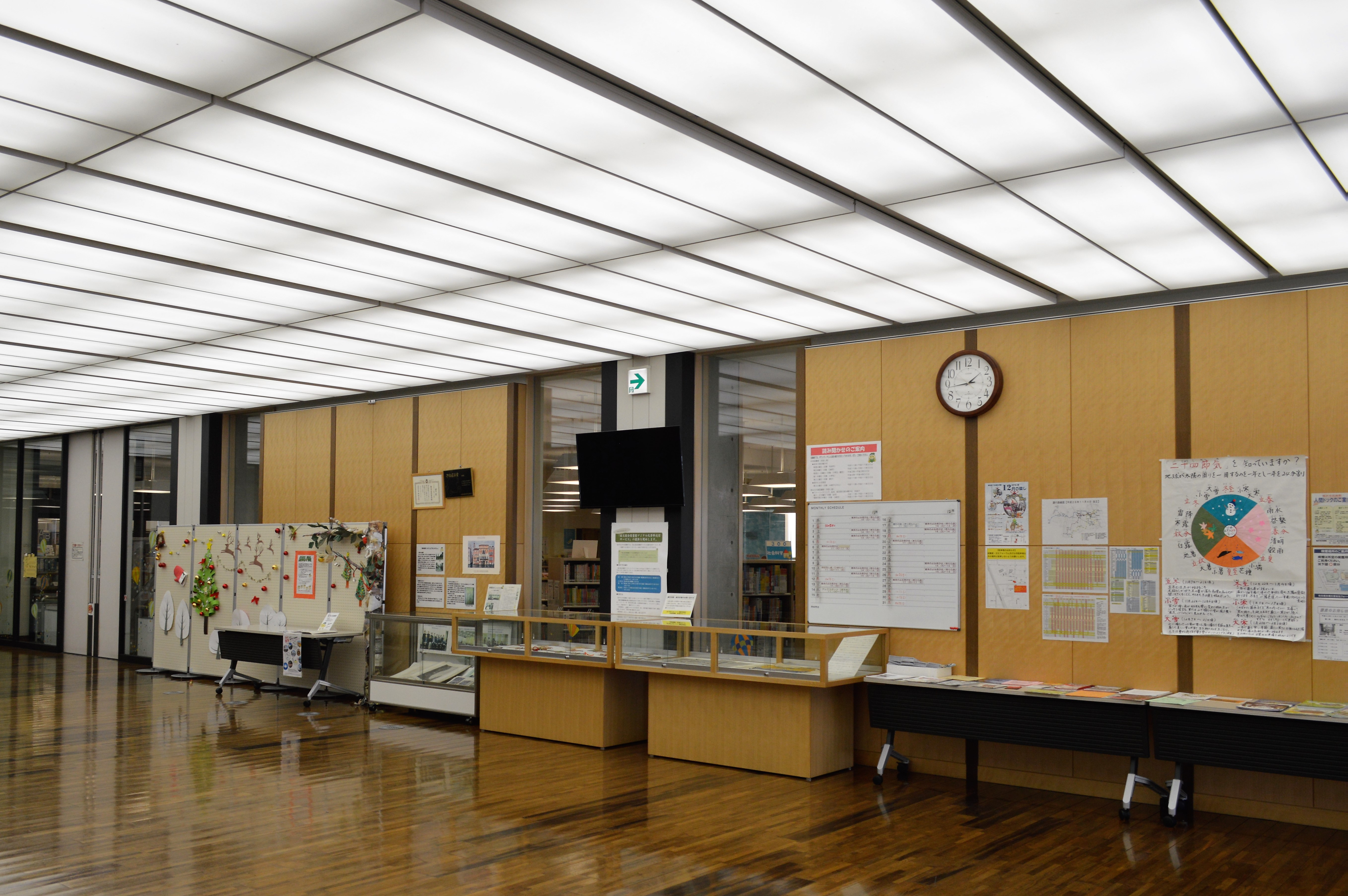 稲沢市中央図書館。ロビー。